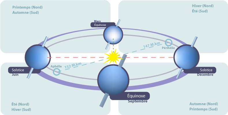 Les saisons, solstices et équinoxes sur l'orbite terrestre.